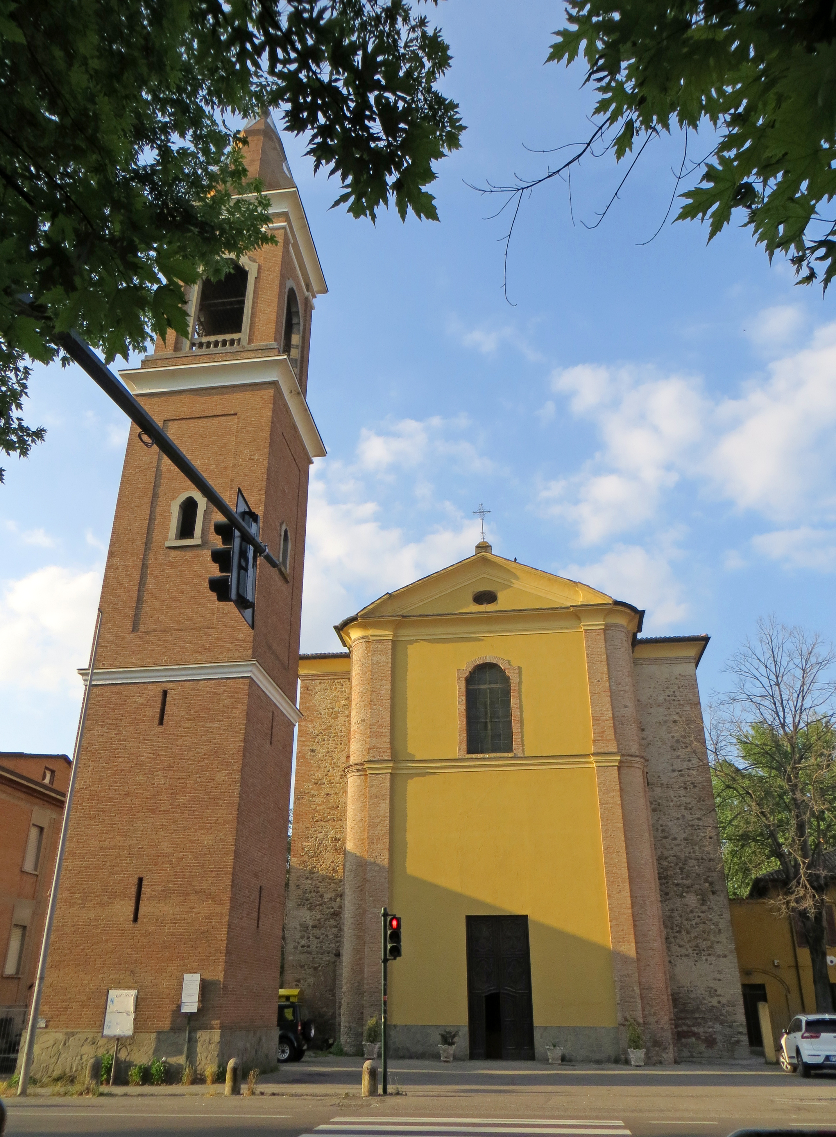 Chiesa di San Prospero (San Prospero Parmense, Parma) - facciata e campanile